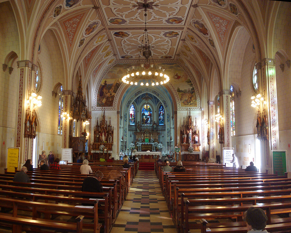 Interior da Igreja de São Pedro, Porto Alegre, Brasil.